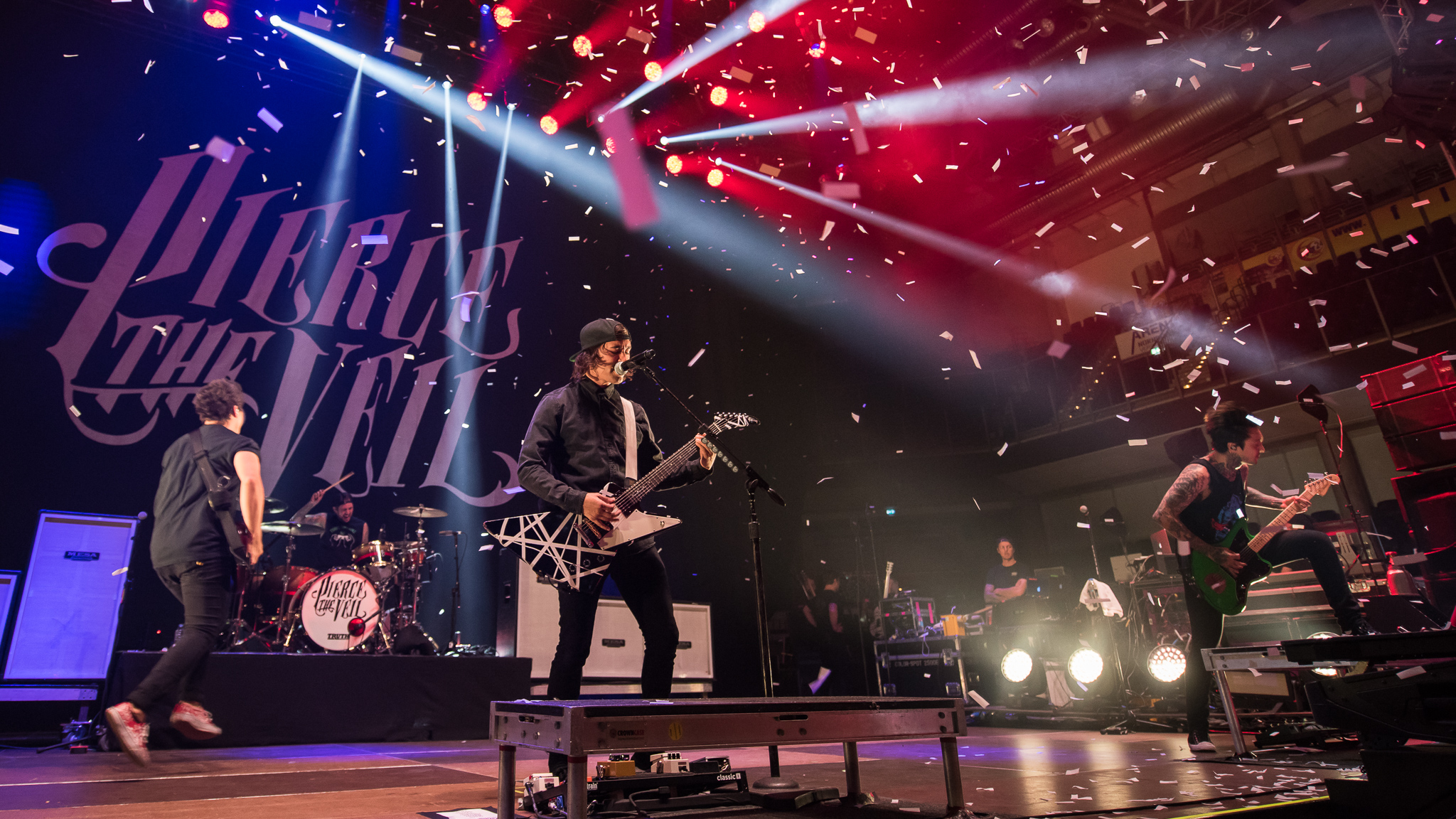 ARGO-Konzerte,Arena Nürnberger Versicherungen,Engelbert Strauss Alternarena,Jaime Alberto Preciado,Jaime Preciado,Konzert,Livekonzert,Livemusik,Michael Christopher Fuentes,Mike Fuentes,Musik,Pierce the Veil,RiP,Rock im Park 2017,Tony Perry,Vic Fuentes,Victor Vincent Fuentes